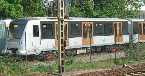 Photo d'un boa